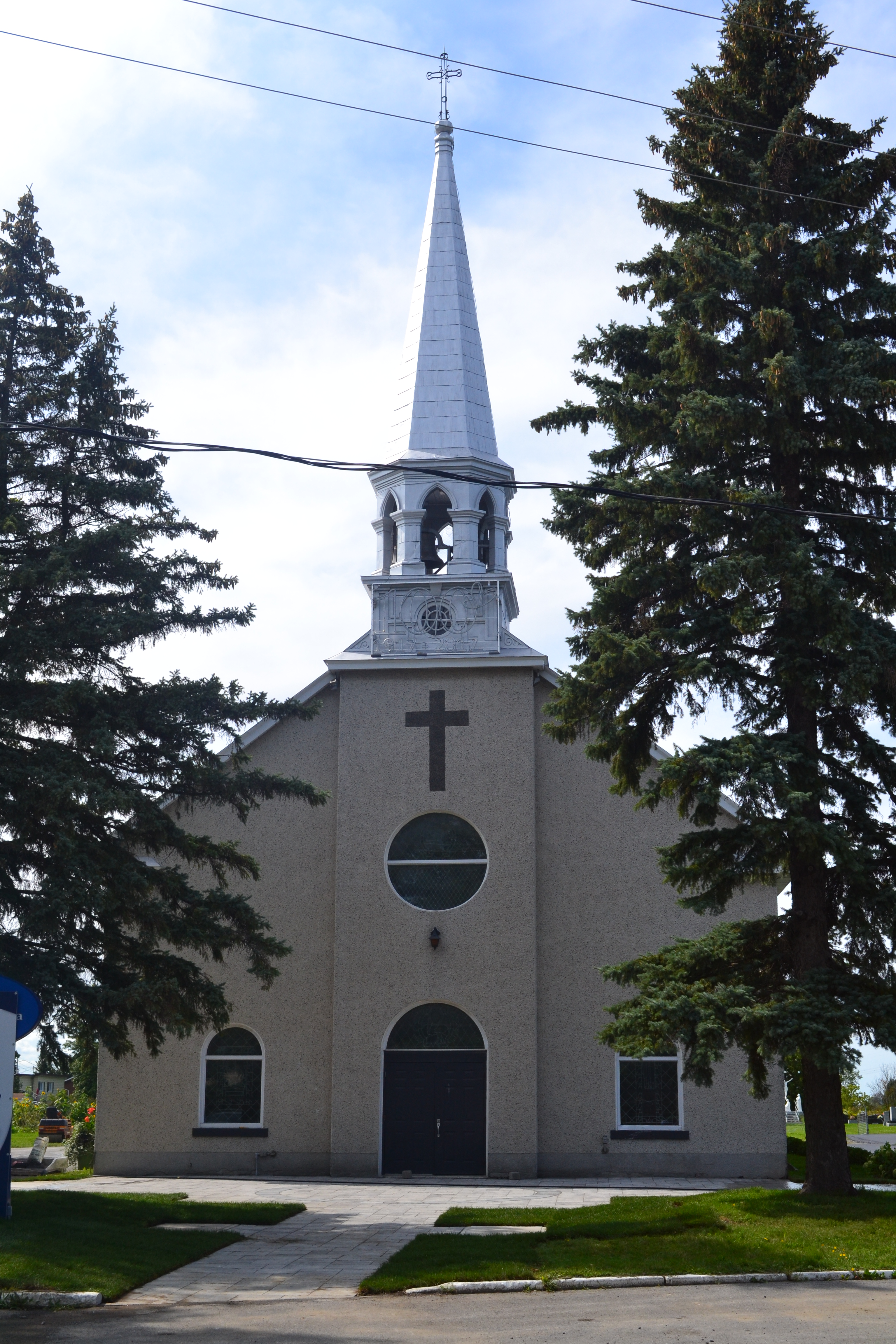 Face avant de l'église de Saint-Mathieu, Quebec